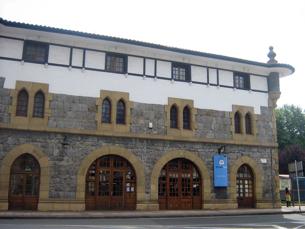 Edificio en el que se ubica el Museo Vasco del Ferrocarril. Es, a su vez, una antigua estación de tren.